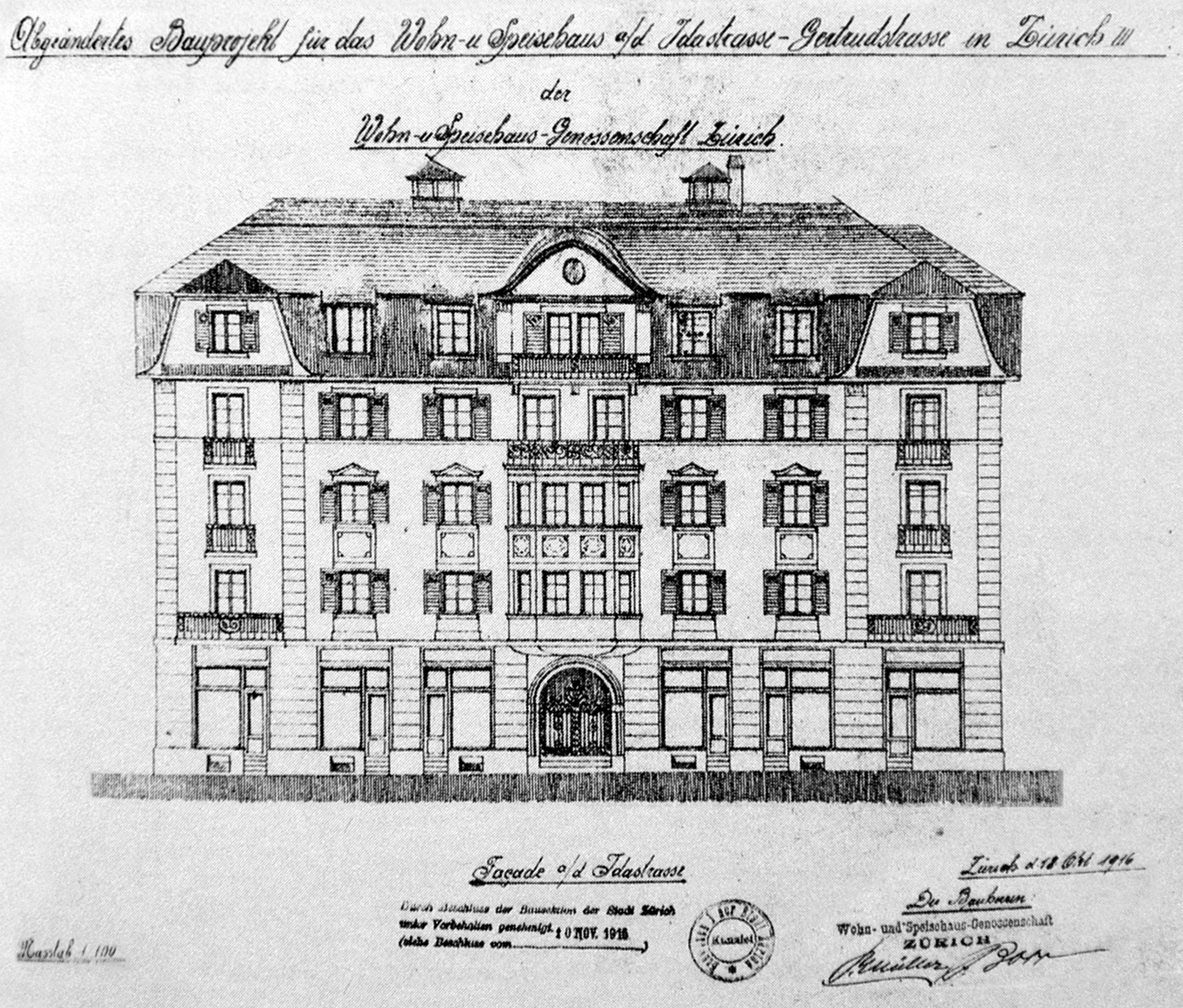 amerikanerhaus in zürich entwurfszeichnung